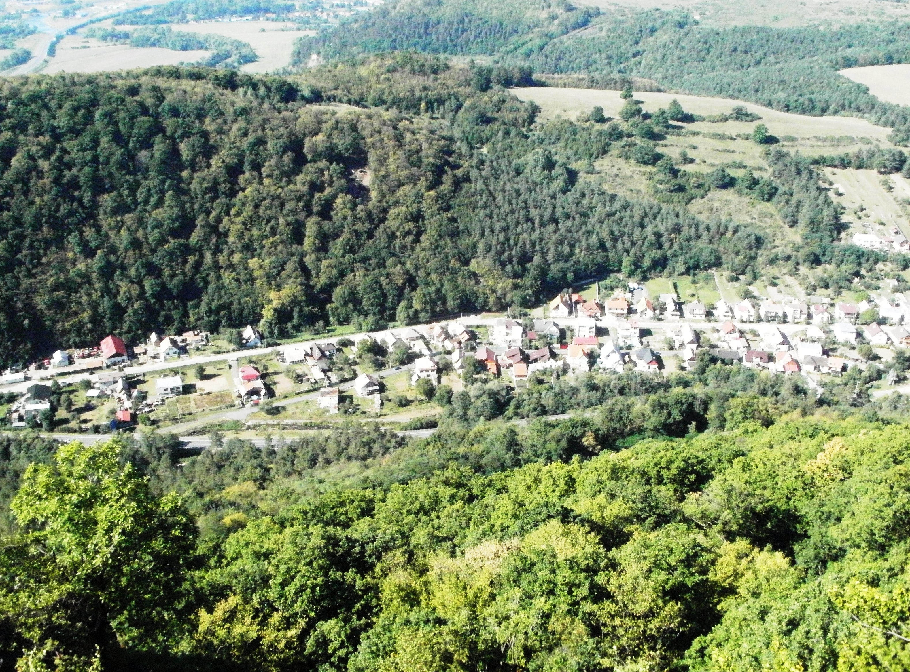 Pohľad na Starú Kremničku z vrchu Kamenica